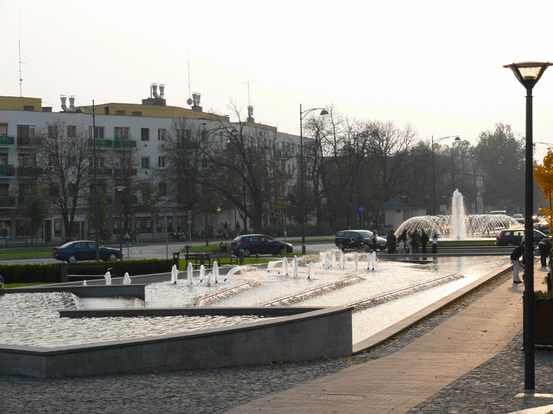 Gyulai szökőkút